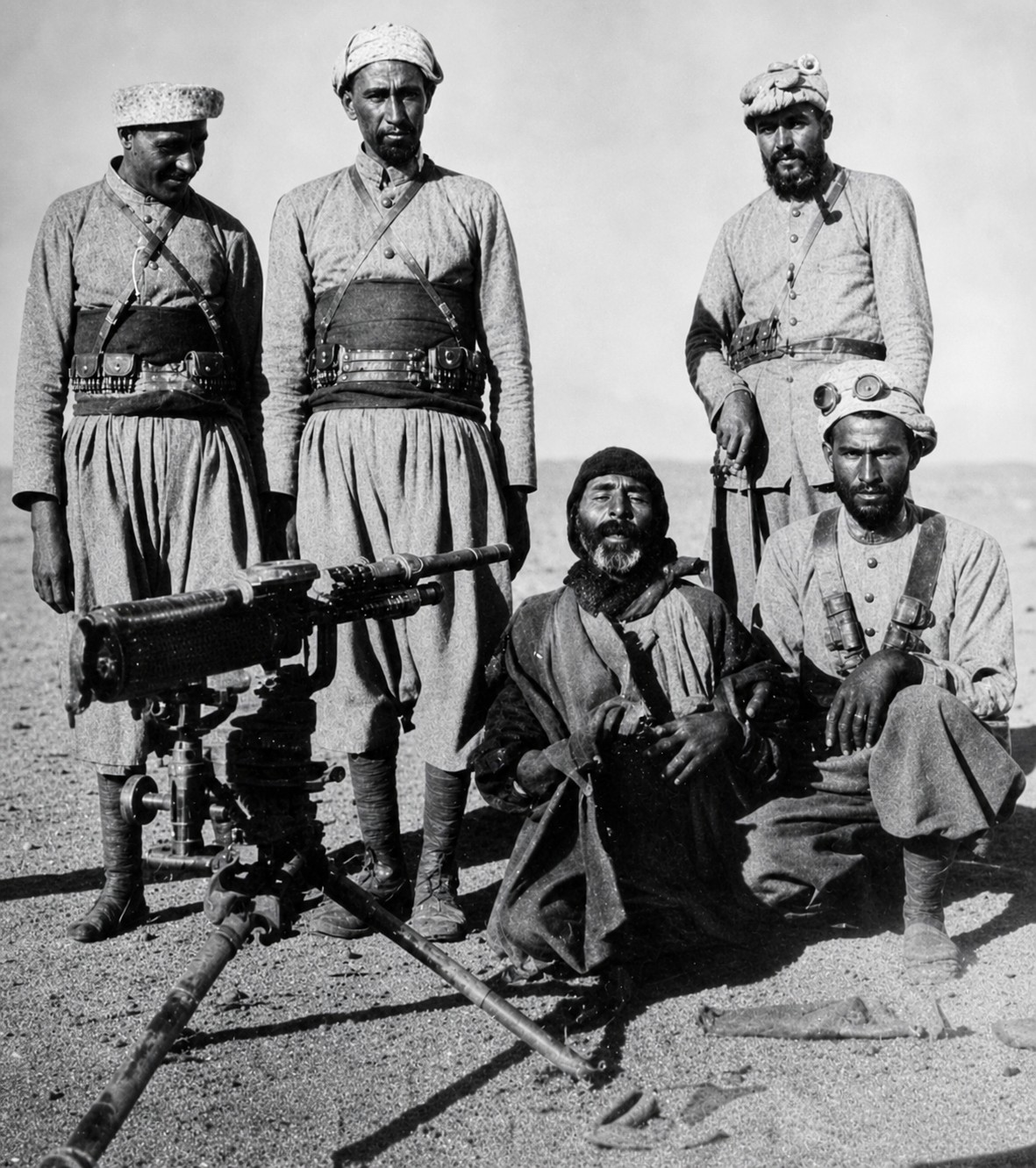 المجاهد حسن العبد السلامه المحمد العساف الملقب بالوليقي لحضه إعدامه من قبل الاحتلال الفرنسي على اثر عملية عين البو جمعة التي ادت لمقتل ضباط فرنسيين عام 1925